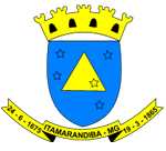 Brasion de la municipalidad de Itamarandiba-MG/Brasil